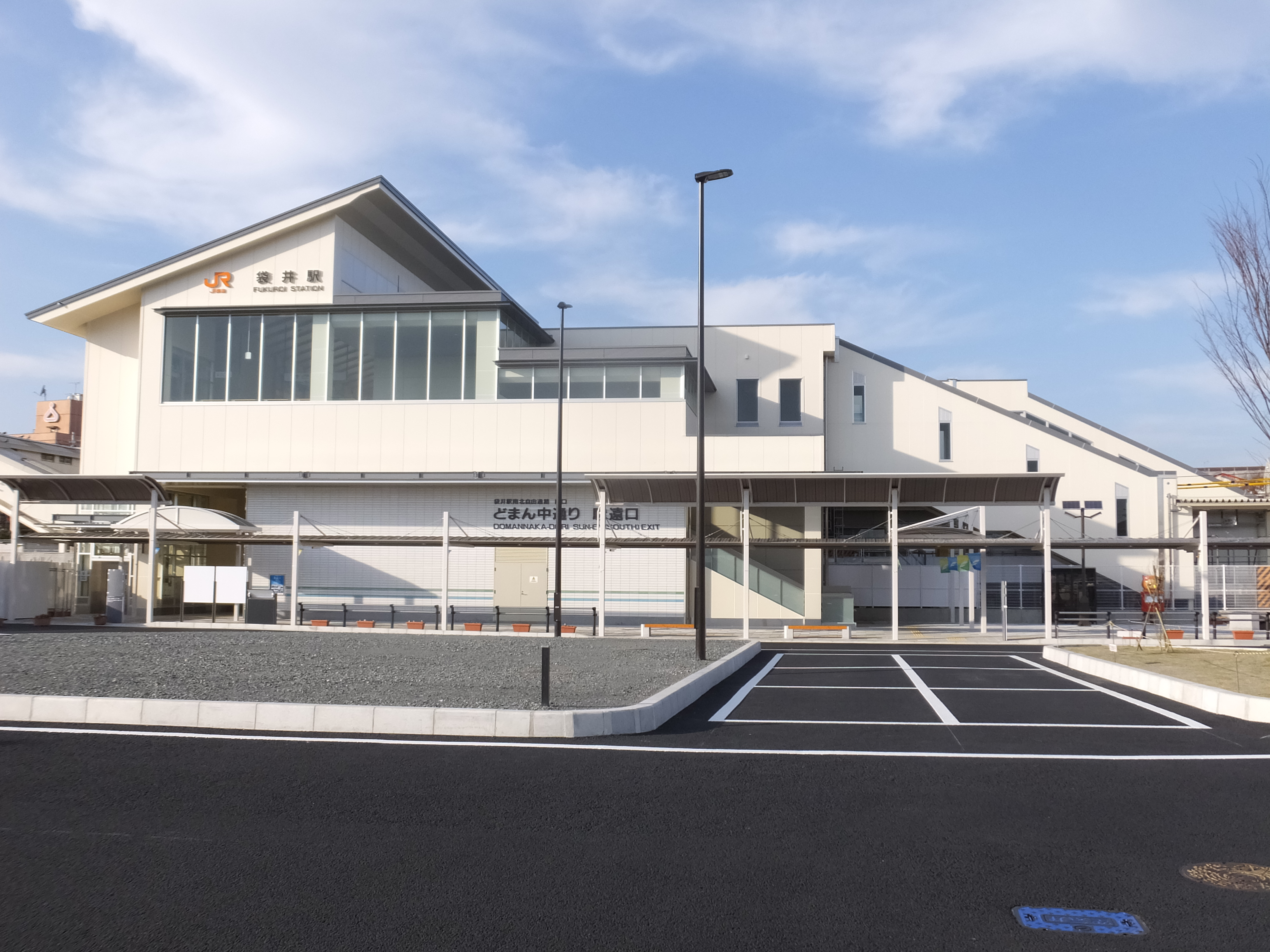 JR東海道本線 袋井駅駅舎南口（駿遠口）